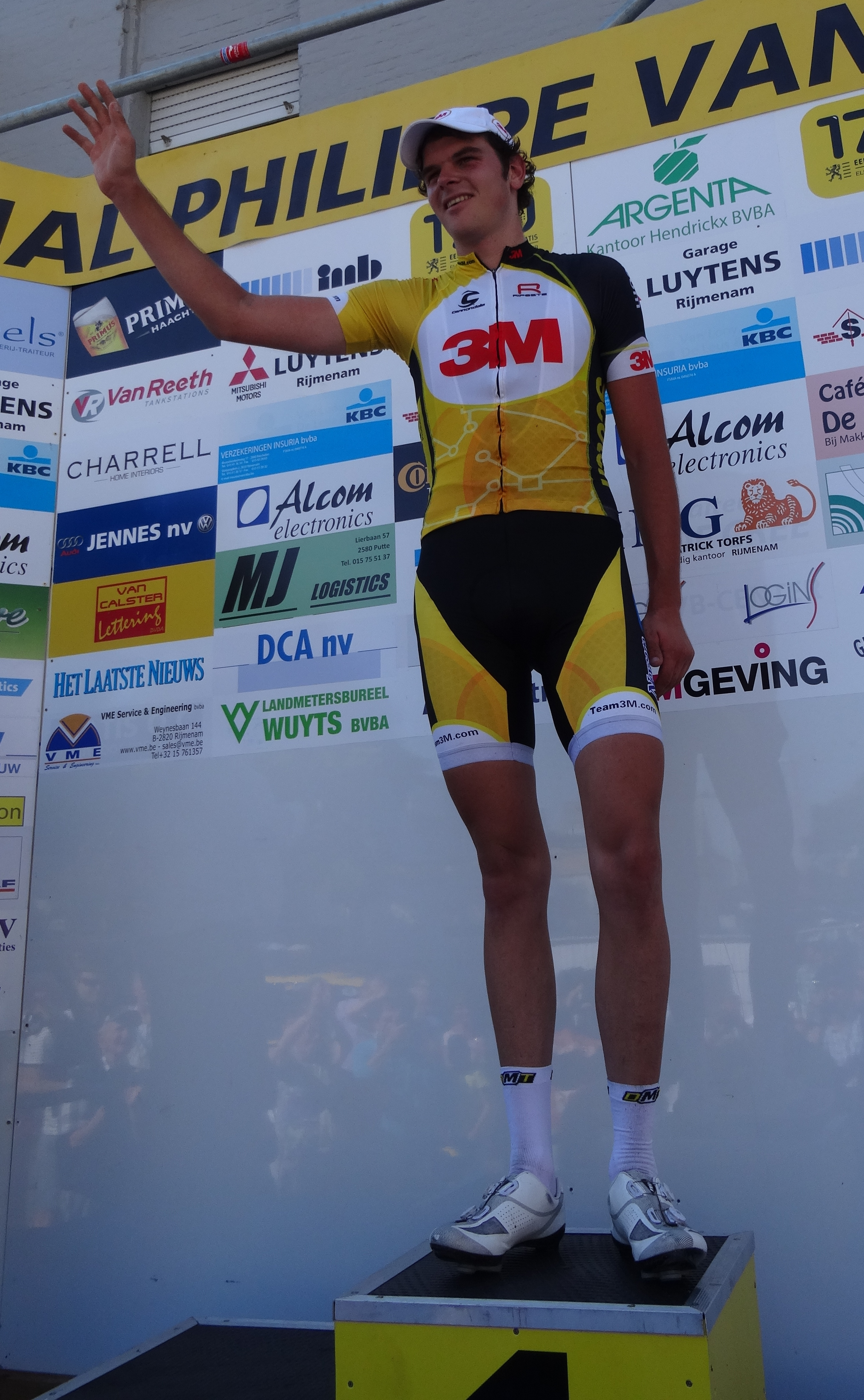 Reportage photographique réalisé le dimanche 8 juin à l'occasion de l'arrivée du Mémorial Philippe Van Coningsloo 2014 à Bonheiden, Belgique.